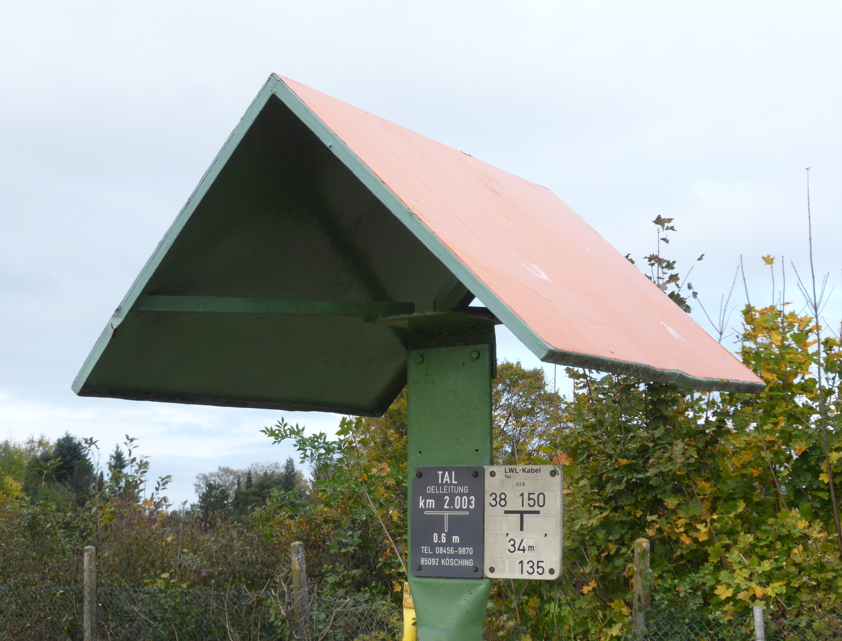 Kennzeichnung der Transalpinen Ölleitung (TAL) in der Nähe von Ingolstadt.